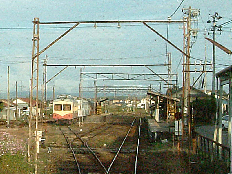 くりはら田園鉄道線 若柳駅